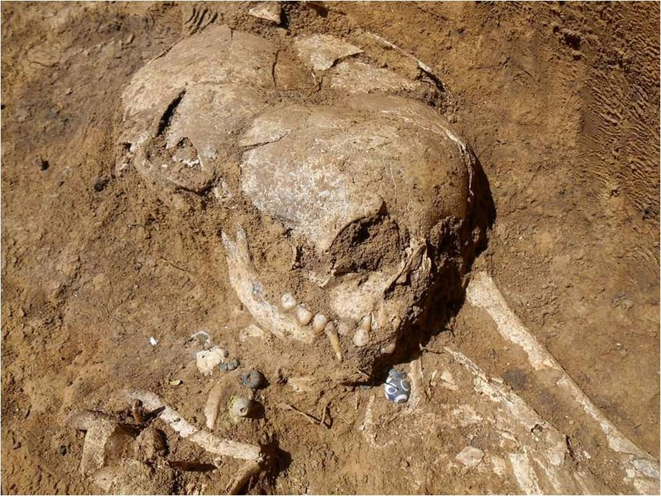 Дитяча поховальна камера в ніші-підбої. Небіжчик орієнтований головою на Захід.